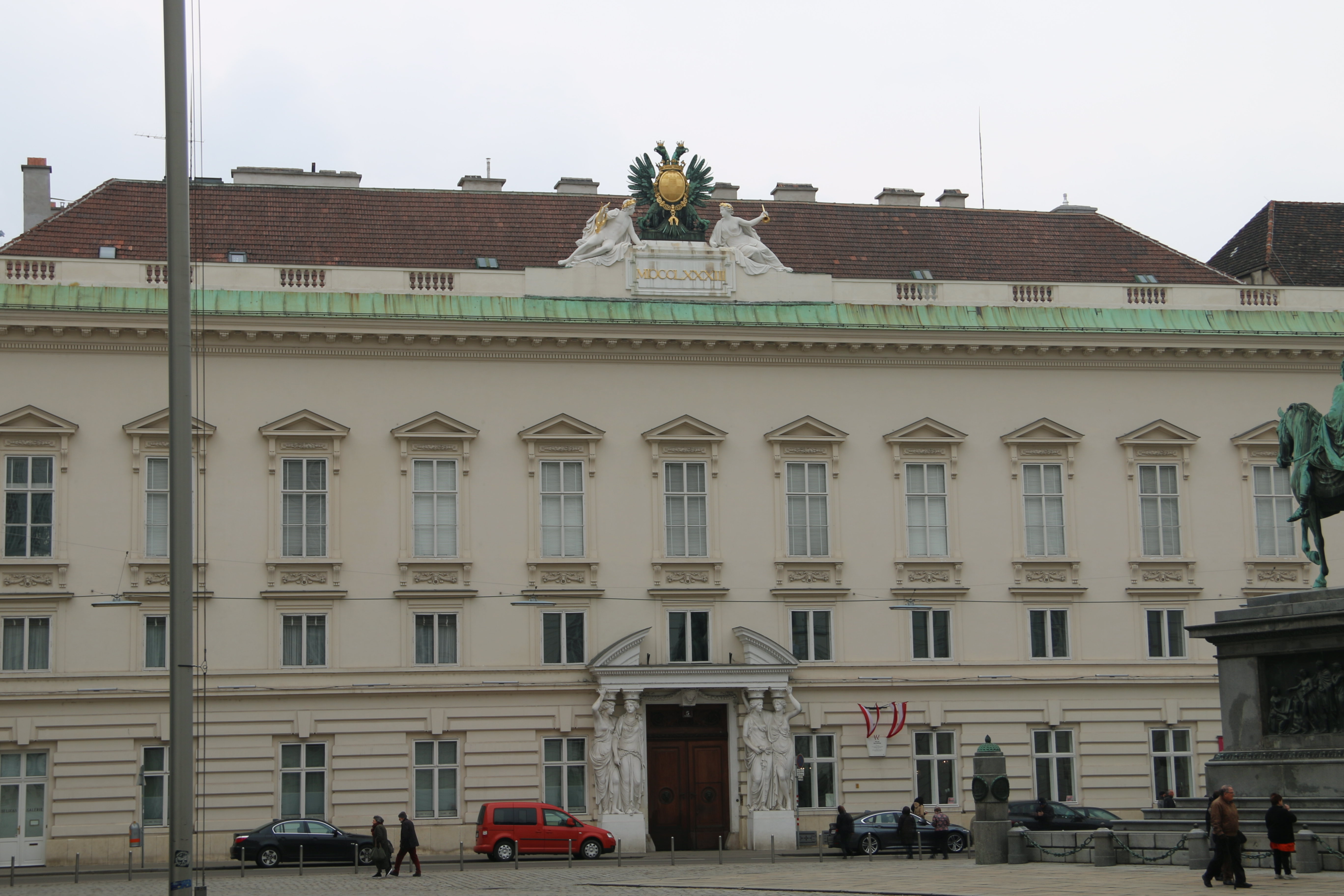 Josefsplatz Wien The making of this document was supported by the Community-Budget of Wikimedia Germany.